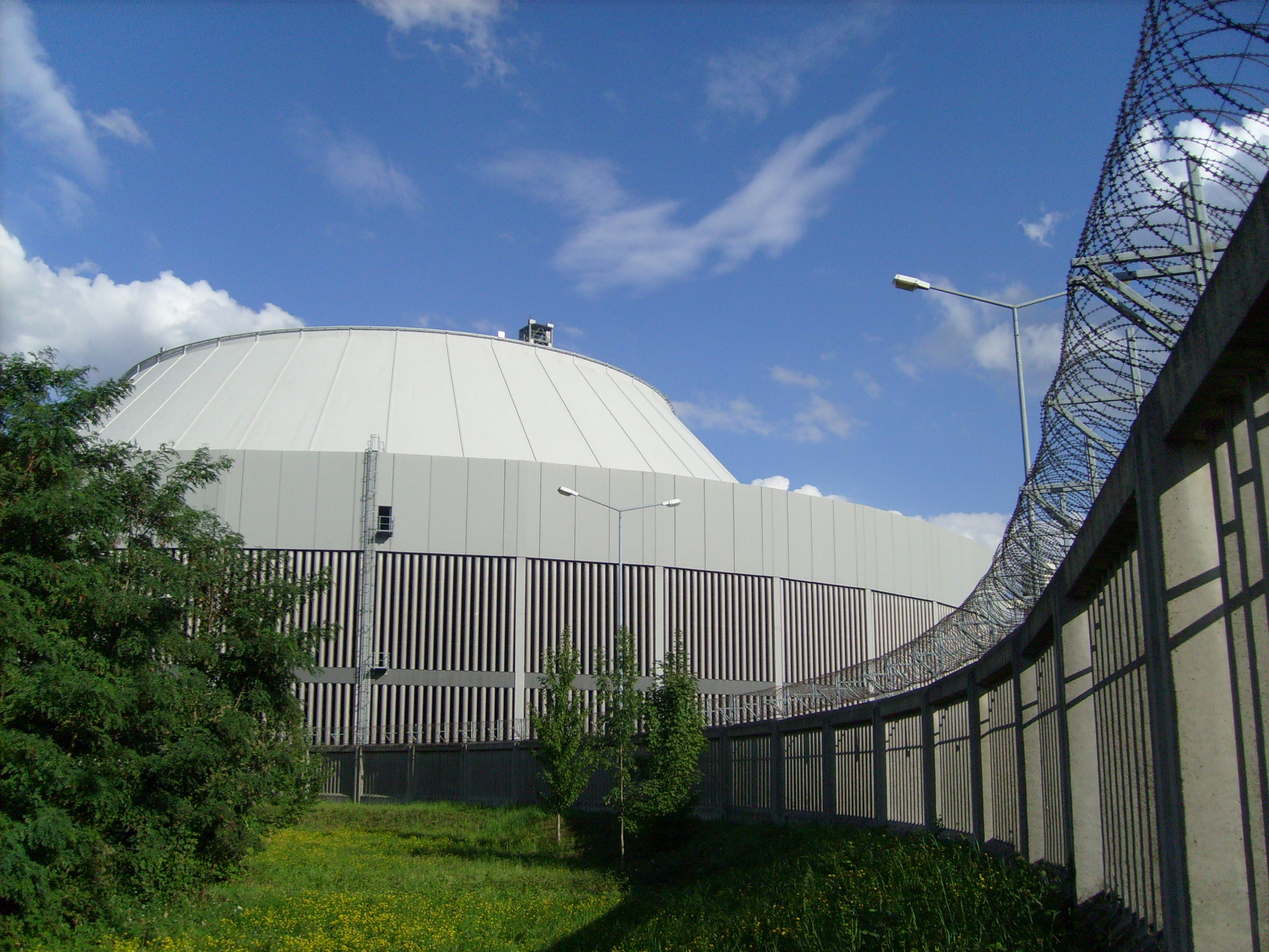 Der Hybridkühlturm des zweiten Blocks im Kernkraftwerk Neckarwestheim